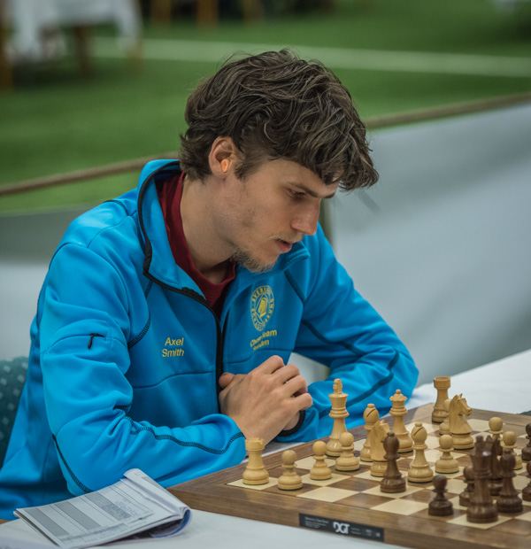 Axel Smith – schackspelare, författare och journalist. Foto: Lars OA Hedlund